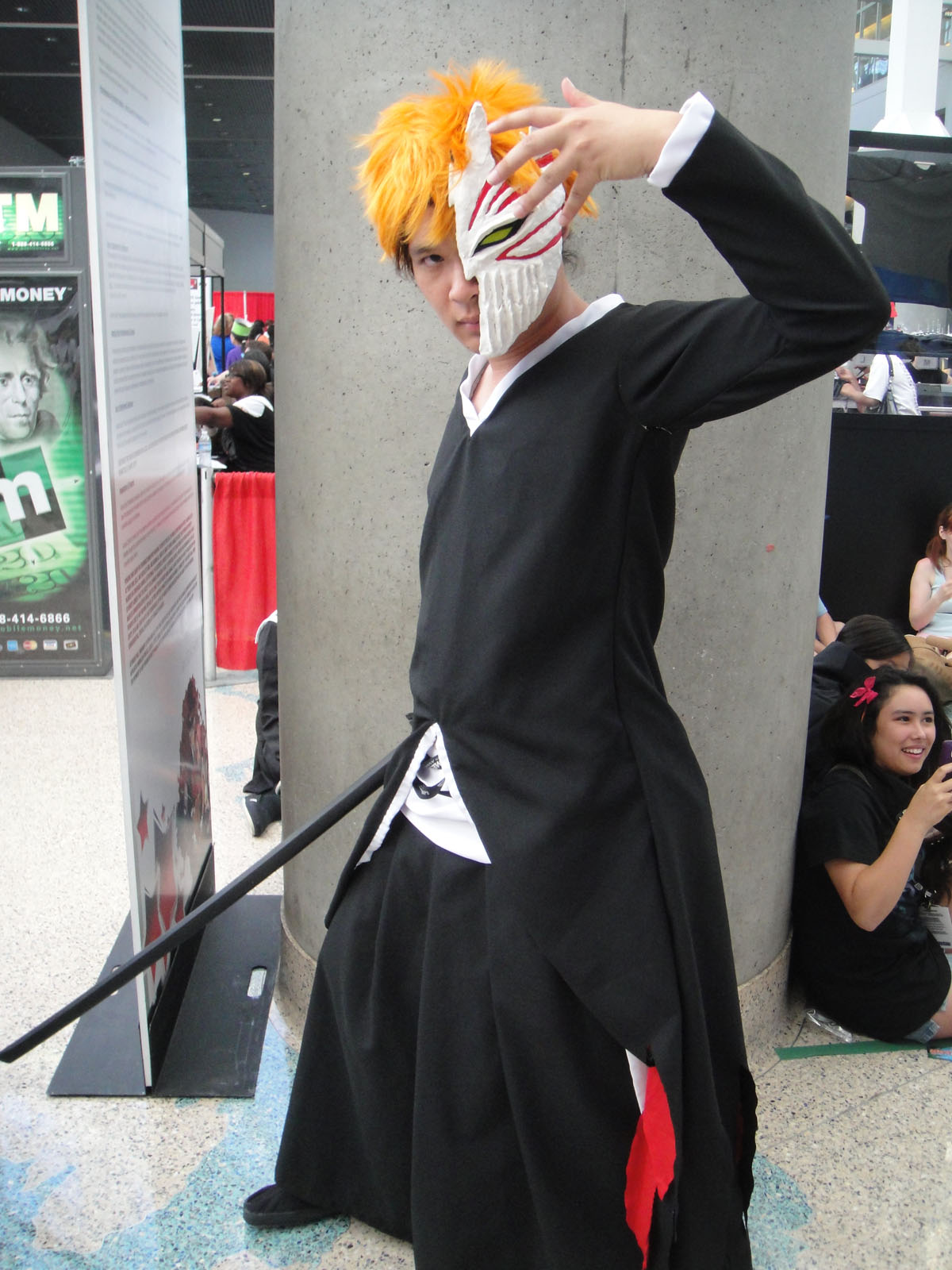 Anime Expo 2011